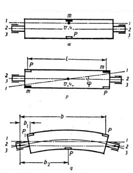 Հավասարակշռման սխեմաներ